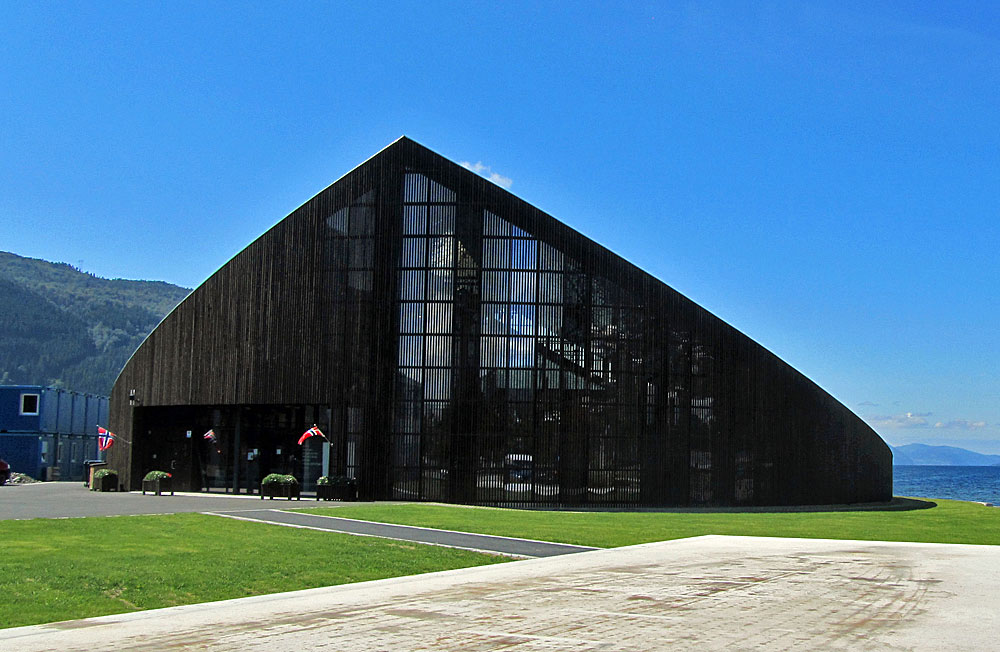 Ausstellungshalle der Sagastad in Nordfjordeid.